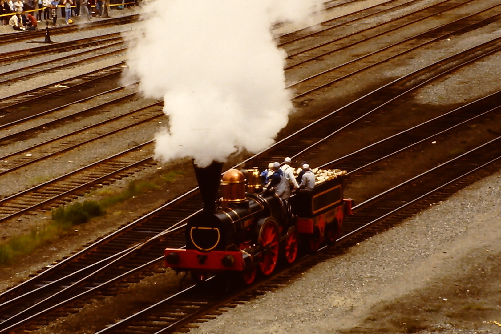 Dampflokomotive John Molson (Replikat) auf der SteamExpo 86